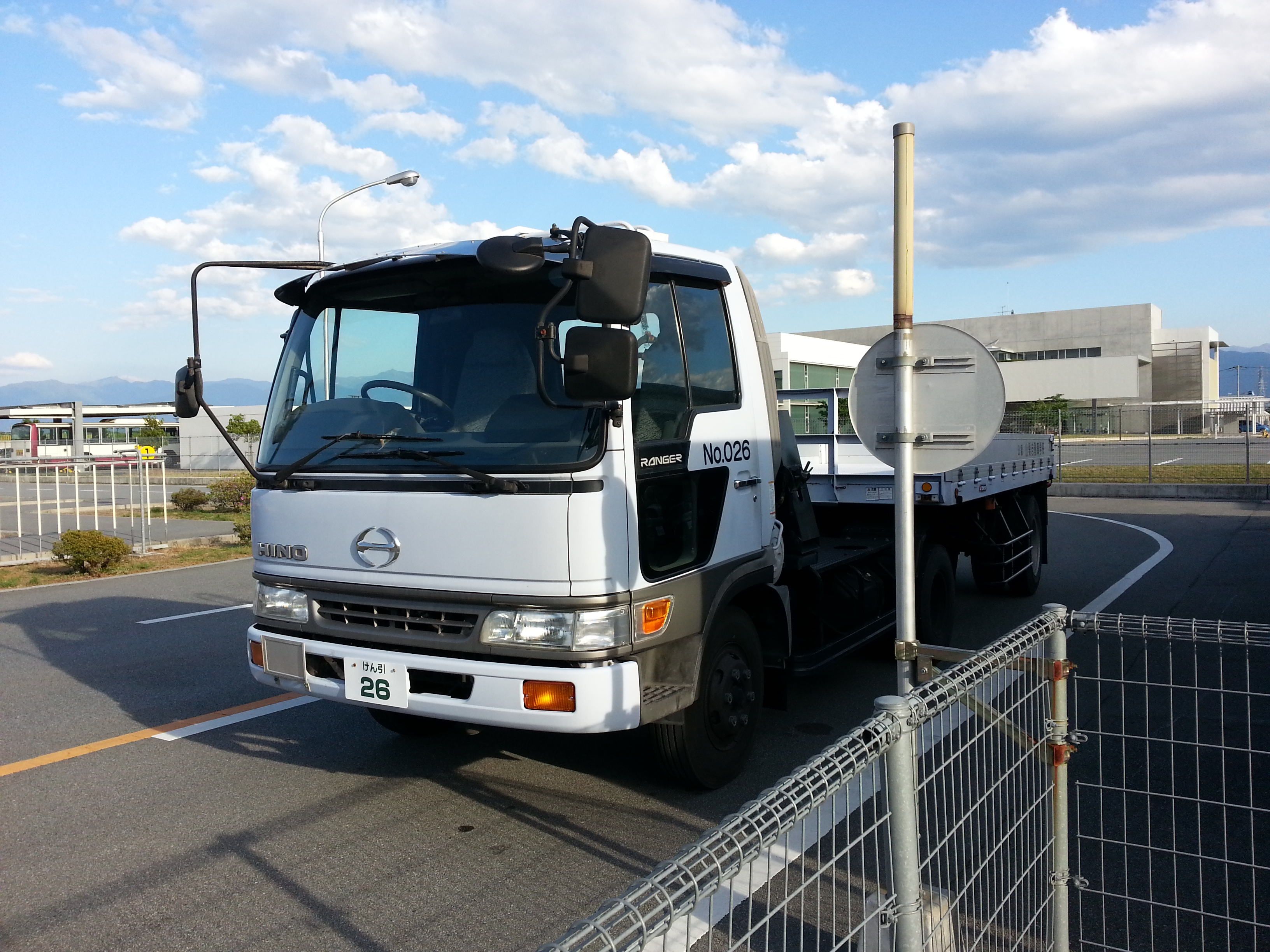 日野レンジャーベースのけん引教習車 トラクター部分はレンジャー4t車、トレーラーは東急車両製の8t車です